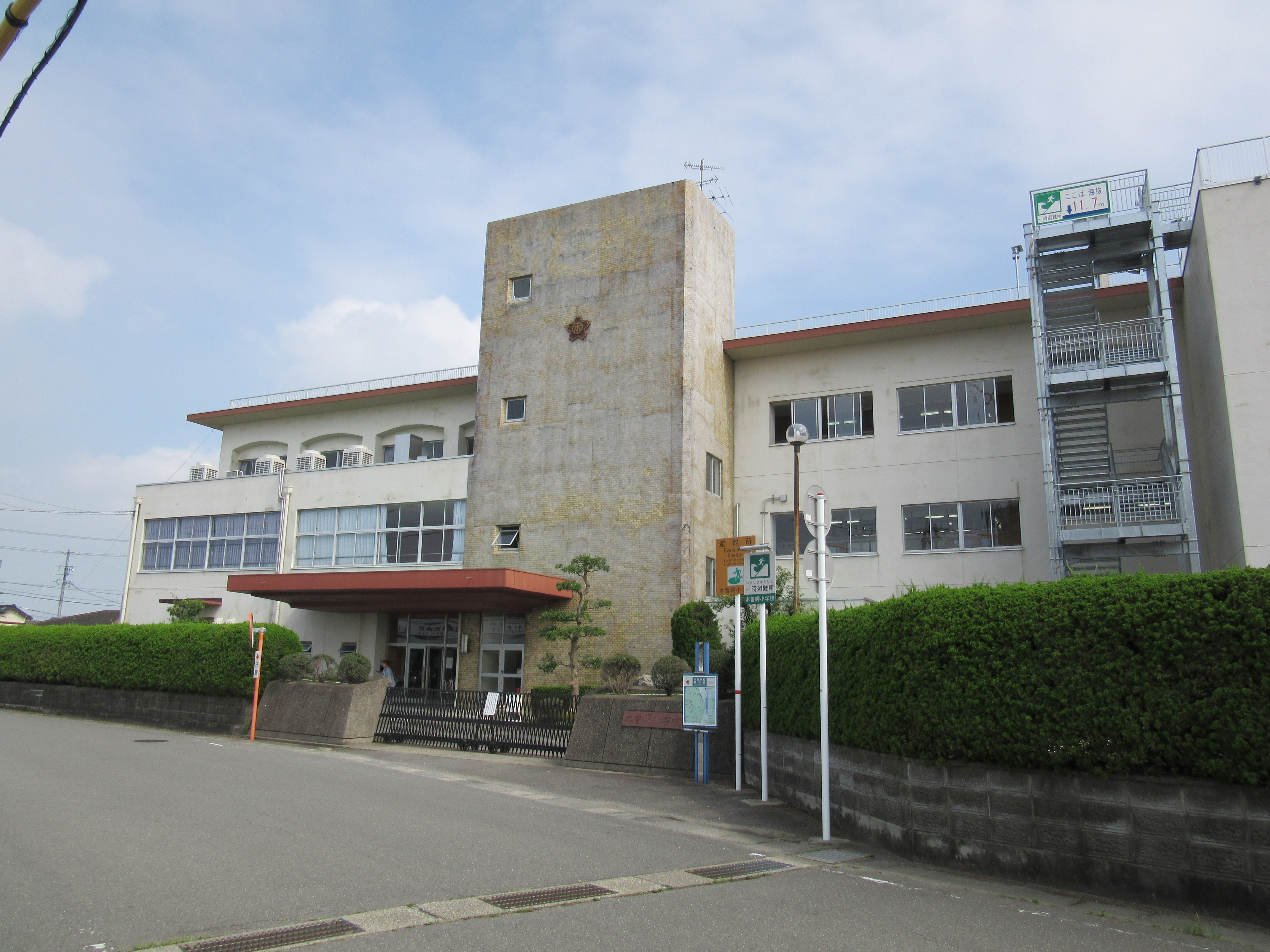 木曽岬小学校